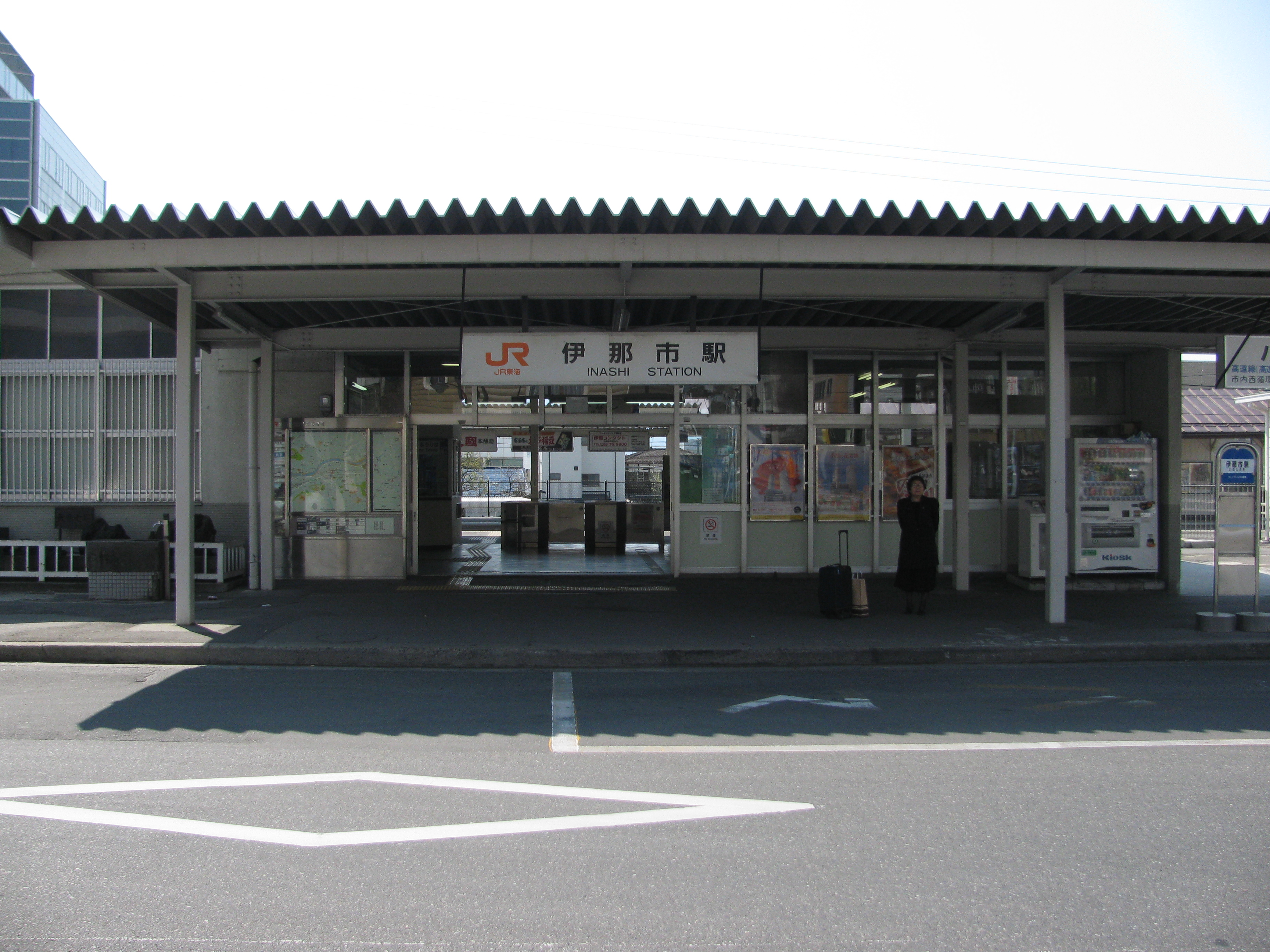 飯田線伊那市駅舎を駅前ロータリーから撮影した写真です。